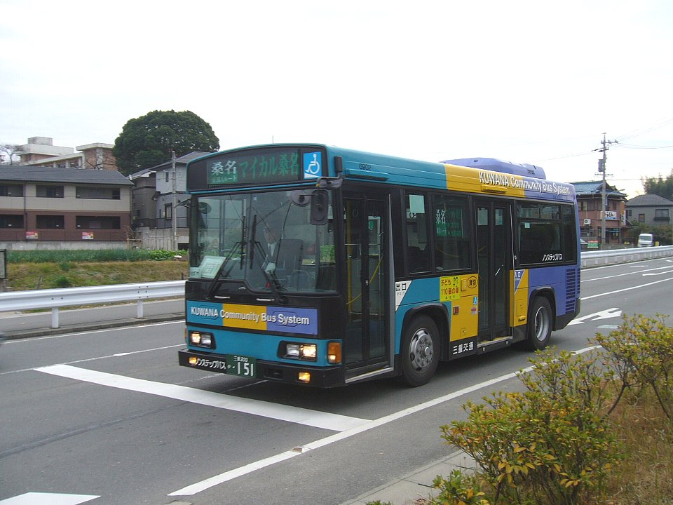 桑名市コミュニティバス「K-バス」天神ヶ丘バス停付近にて